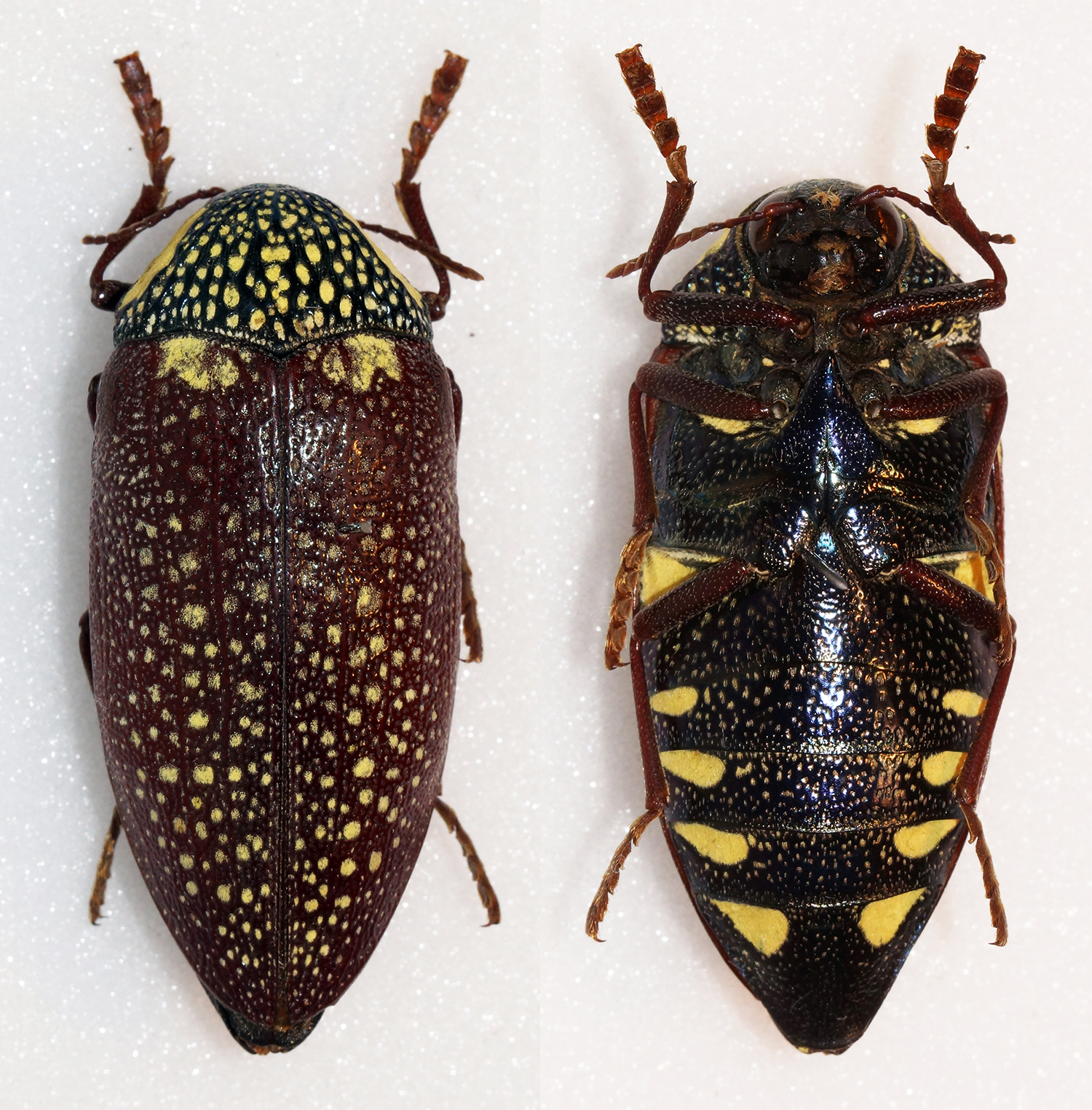 Saunders,1874 Sex: ? Data: 21-03-12 - NE Ethiopia Size: 42mm